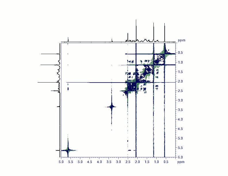 COSY NMR spectrum progesterone